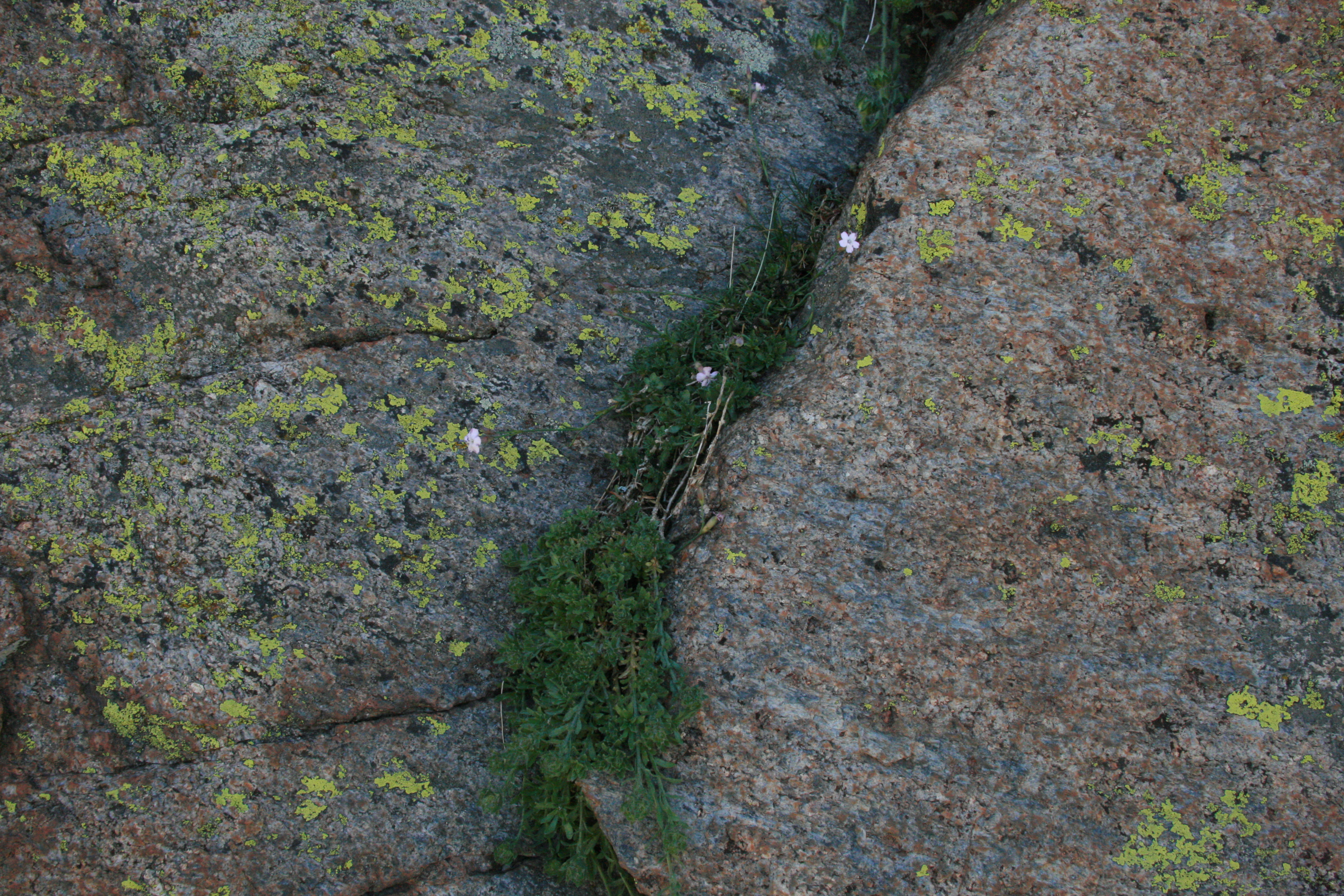 Flora en las inmediaciones de la Laguna Grande del Circo de Gredos en la Sierra de Gredos. España